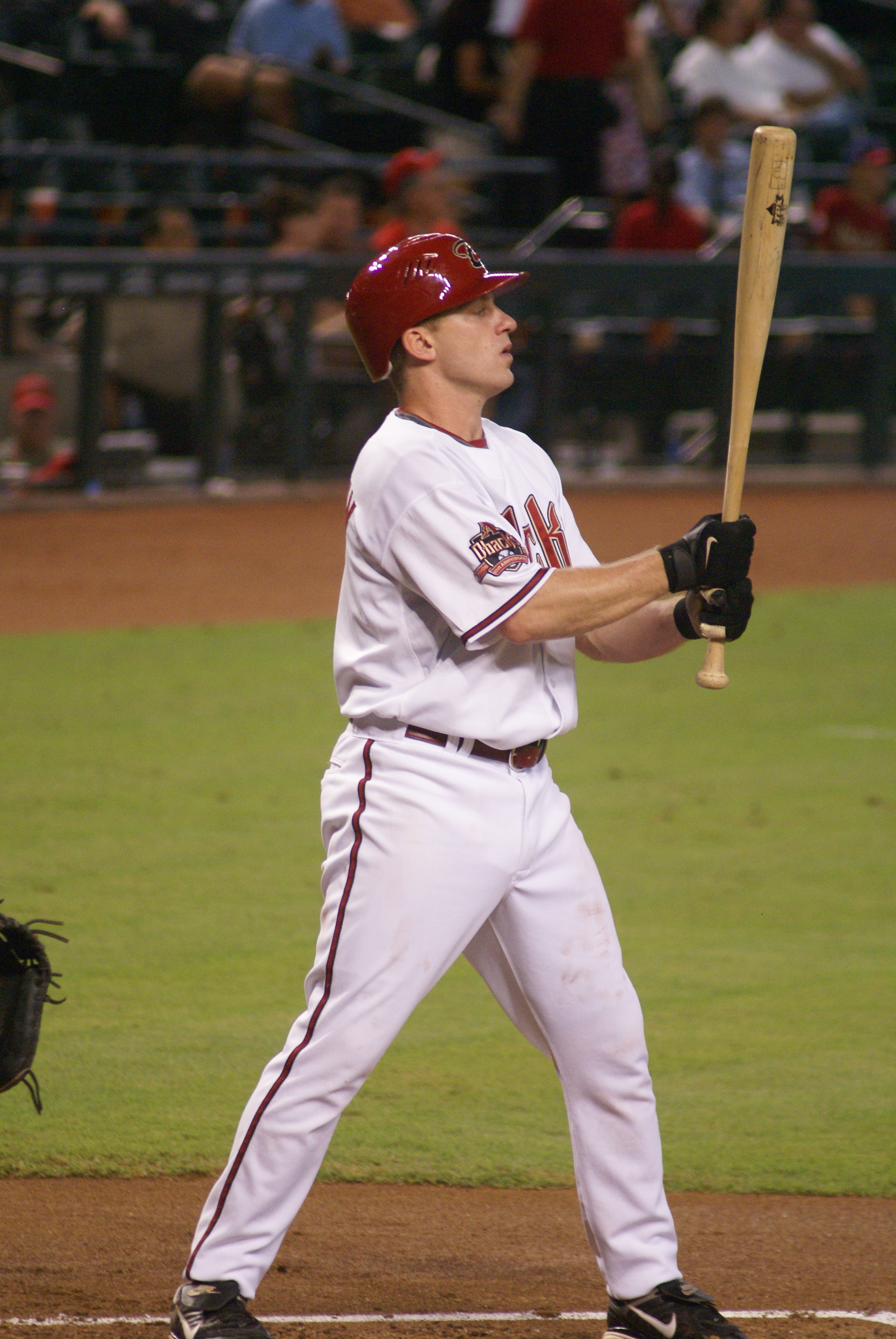 David Eckstein